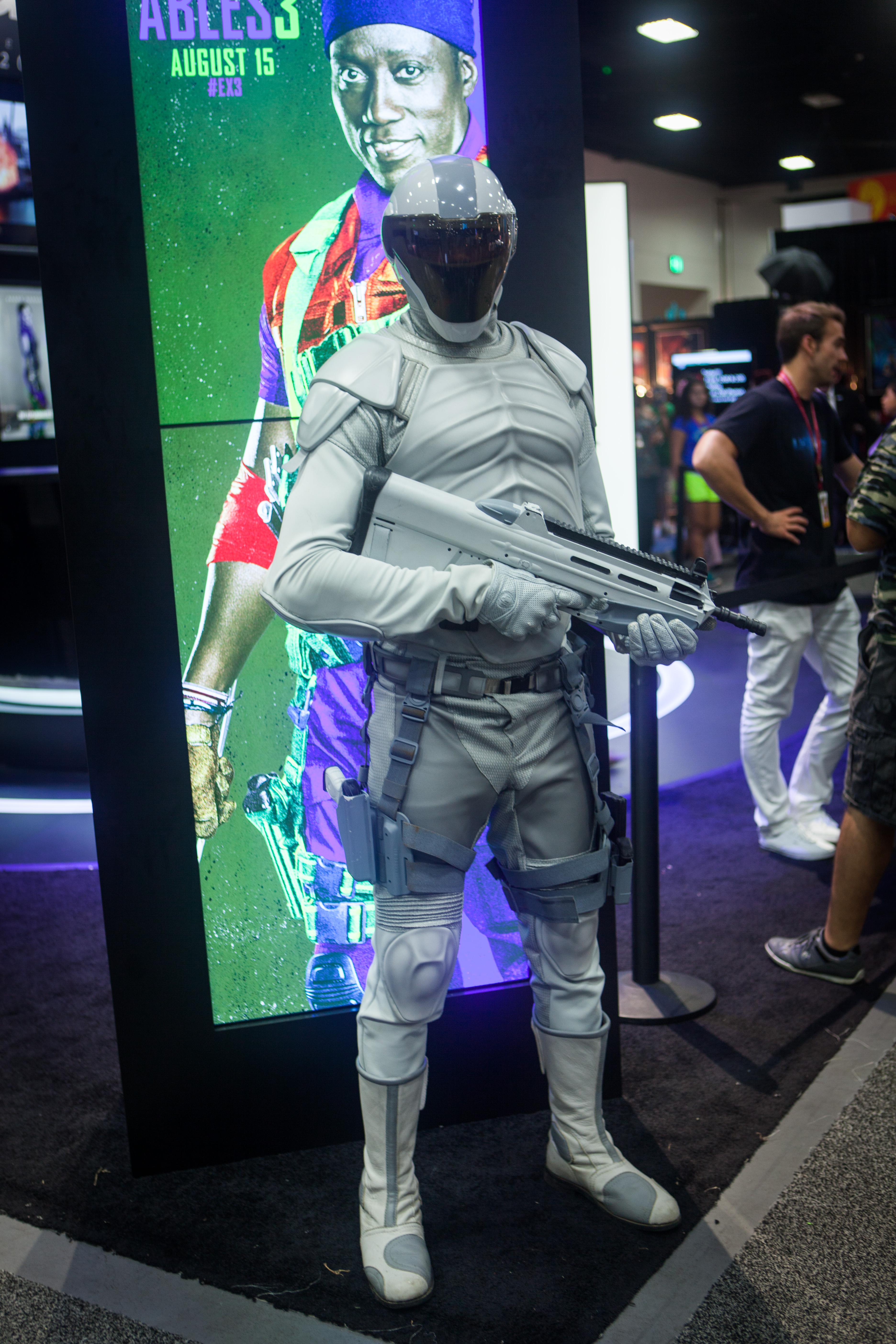 San Diego Comic Con 2014-1449